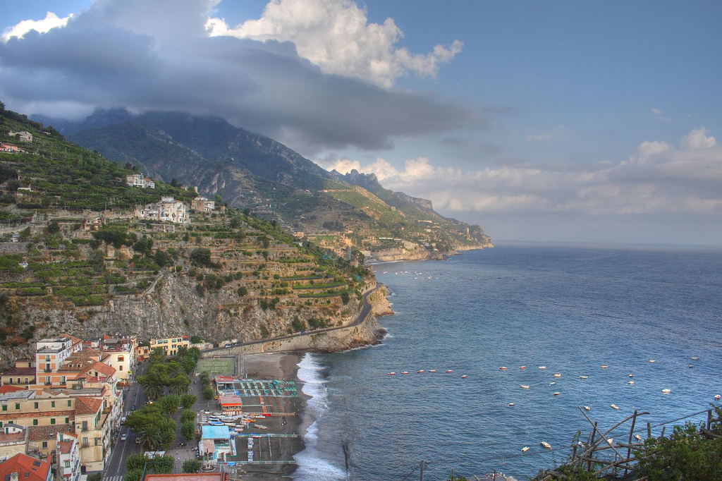 La costiera da Minori, Golfo di Salerno